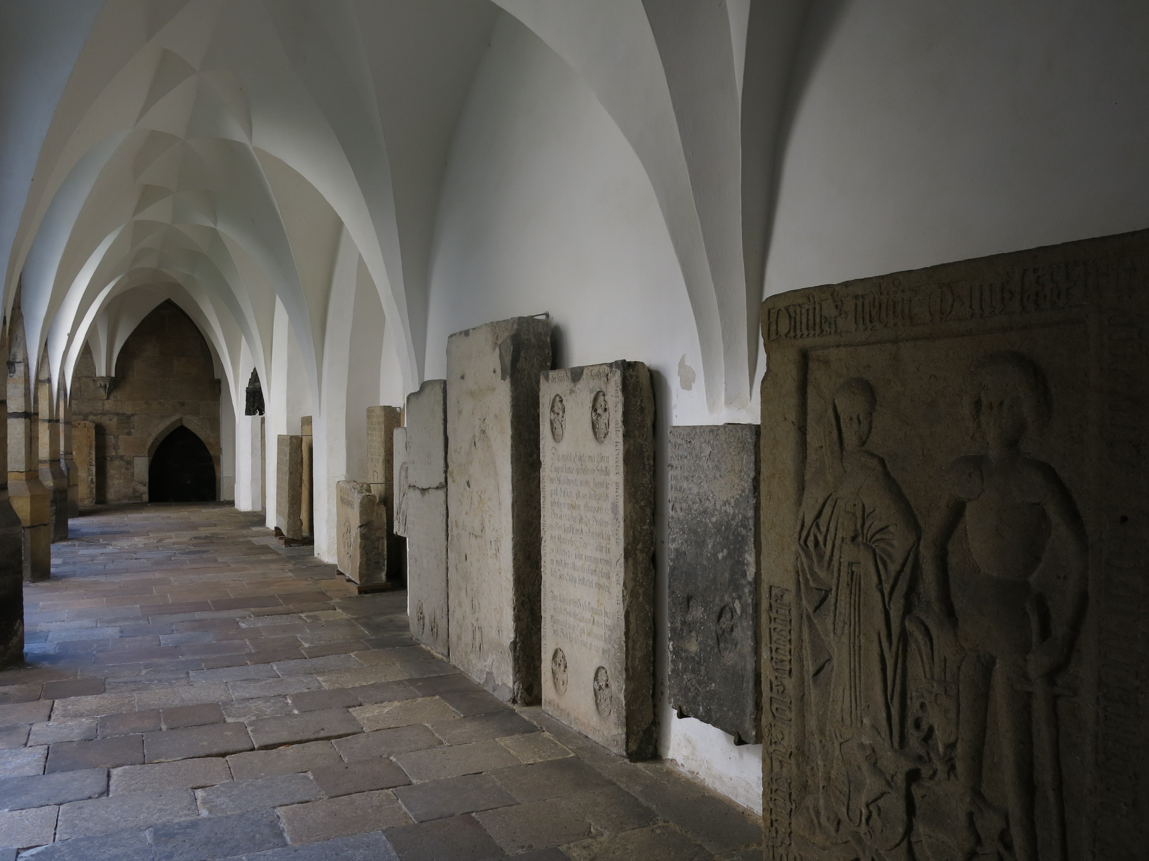 Meißner Dom - Kreuzgang mit Grabsteinen